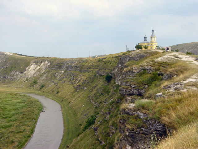 Orheiul Vechi in Moldavië. Eigen foto Mark Voorendt, juli 2005.